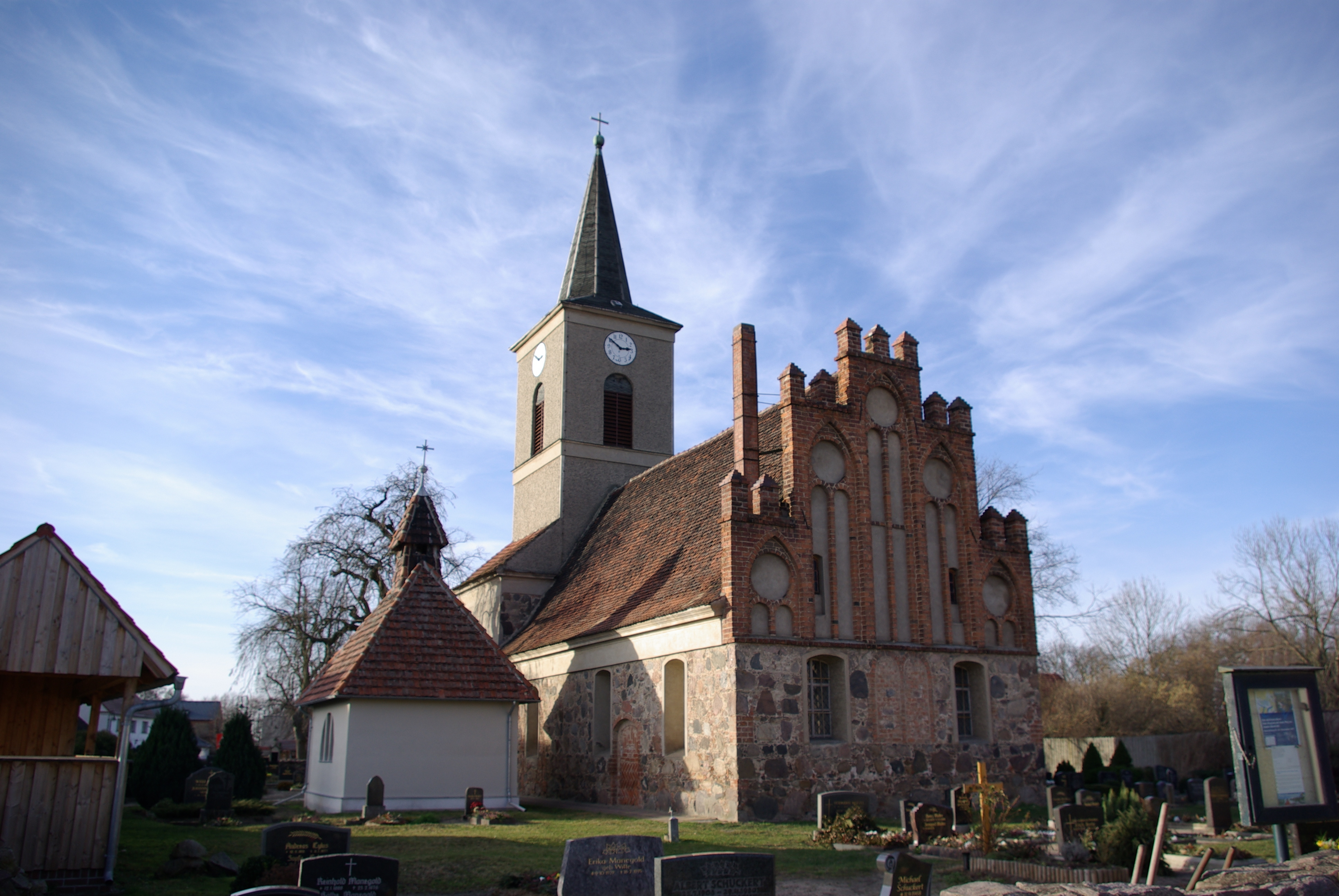 Werder (Havel) Ortsteil Derwitz. Die Kirche in der Mitte des Ortes steht unter Denkmalschutz.